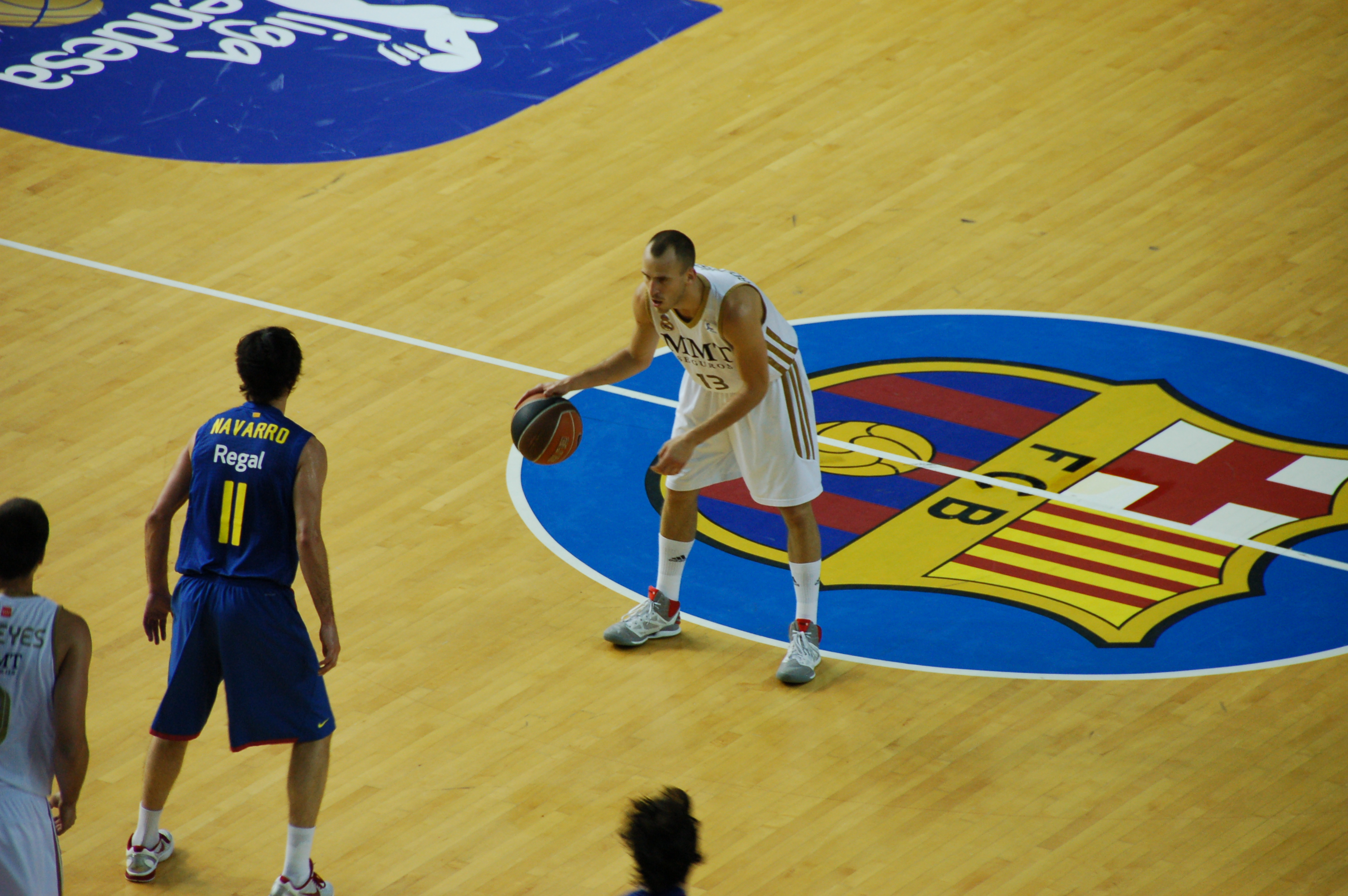 Sergio Rodriguez playing for Real Madrid